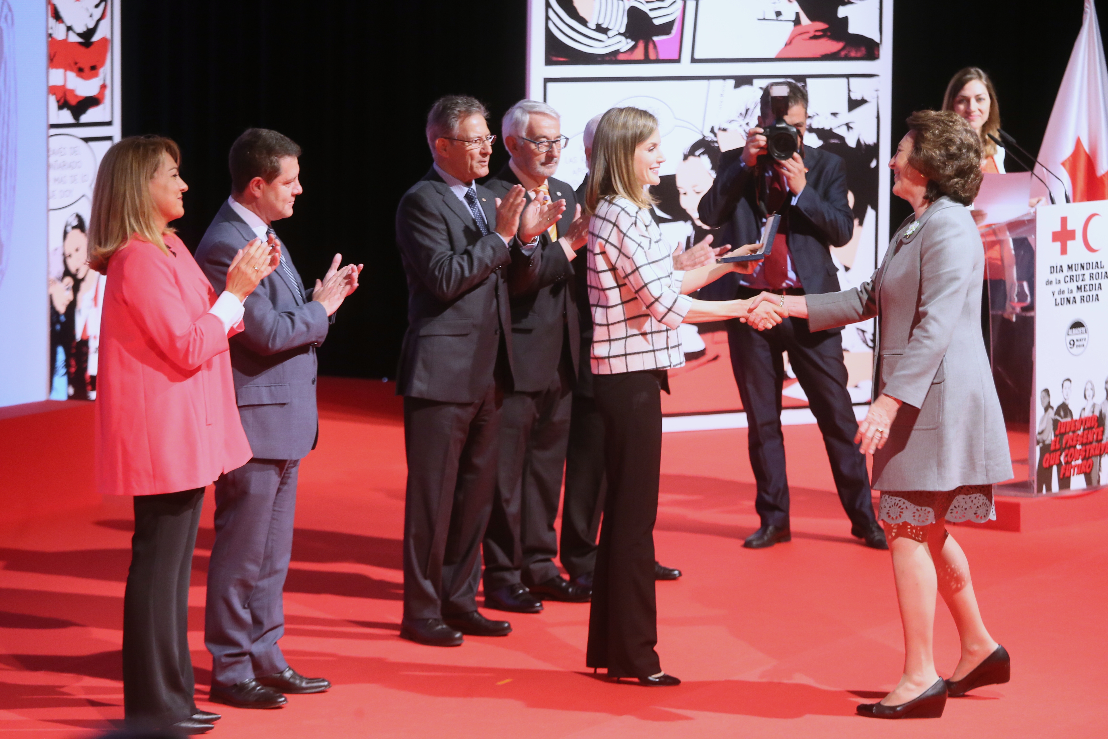 Su Majestad la Reina Letizia. Premios de la Cruz Roja. Día Mundial de la Cruz Roja y de la Media Luna Roja. Palacio de Congresos de Albacete.jpg